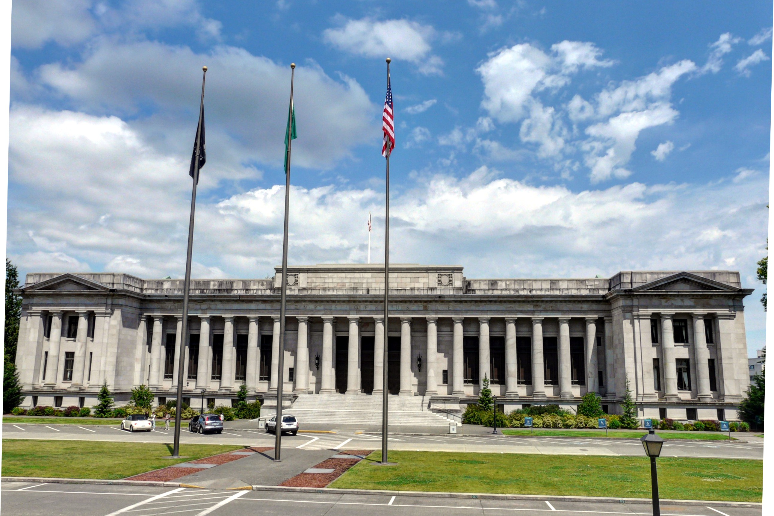 Capitole de l'état de Washington